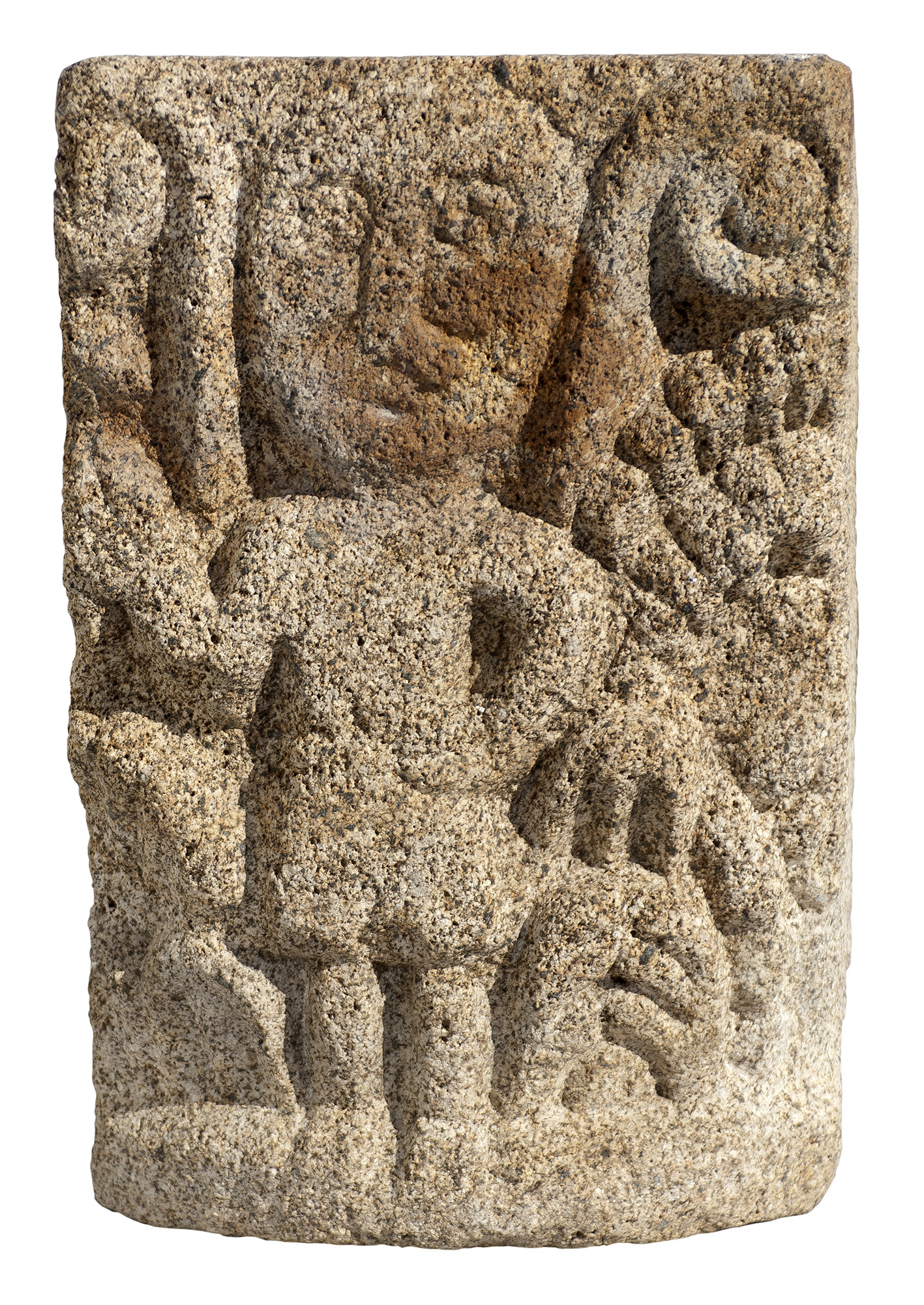 Chapiteau simple en granit sculpté sur une face d'un personnage debout. Le chapiteau est évidé en angle sur l'arrière.